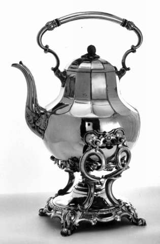 Balansekjel fra ca. 1850 i førsølvet metall. Norsk Folkemuseum, NF.1971-0382AC.